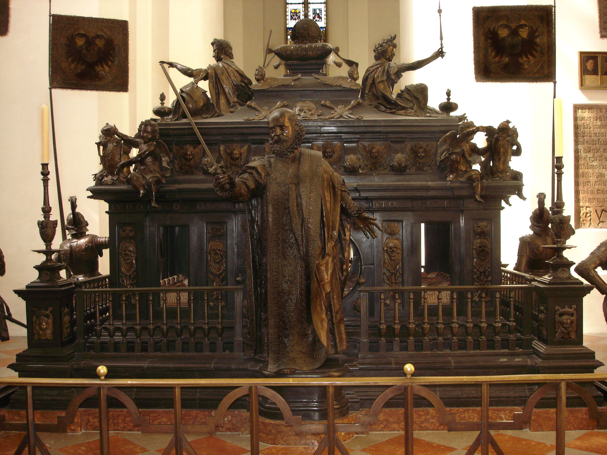 Das Kaiserkenotaph, im Vordergrund Albrecht V. im Ornat des Ordens vom Goldenen Vlies